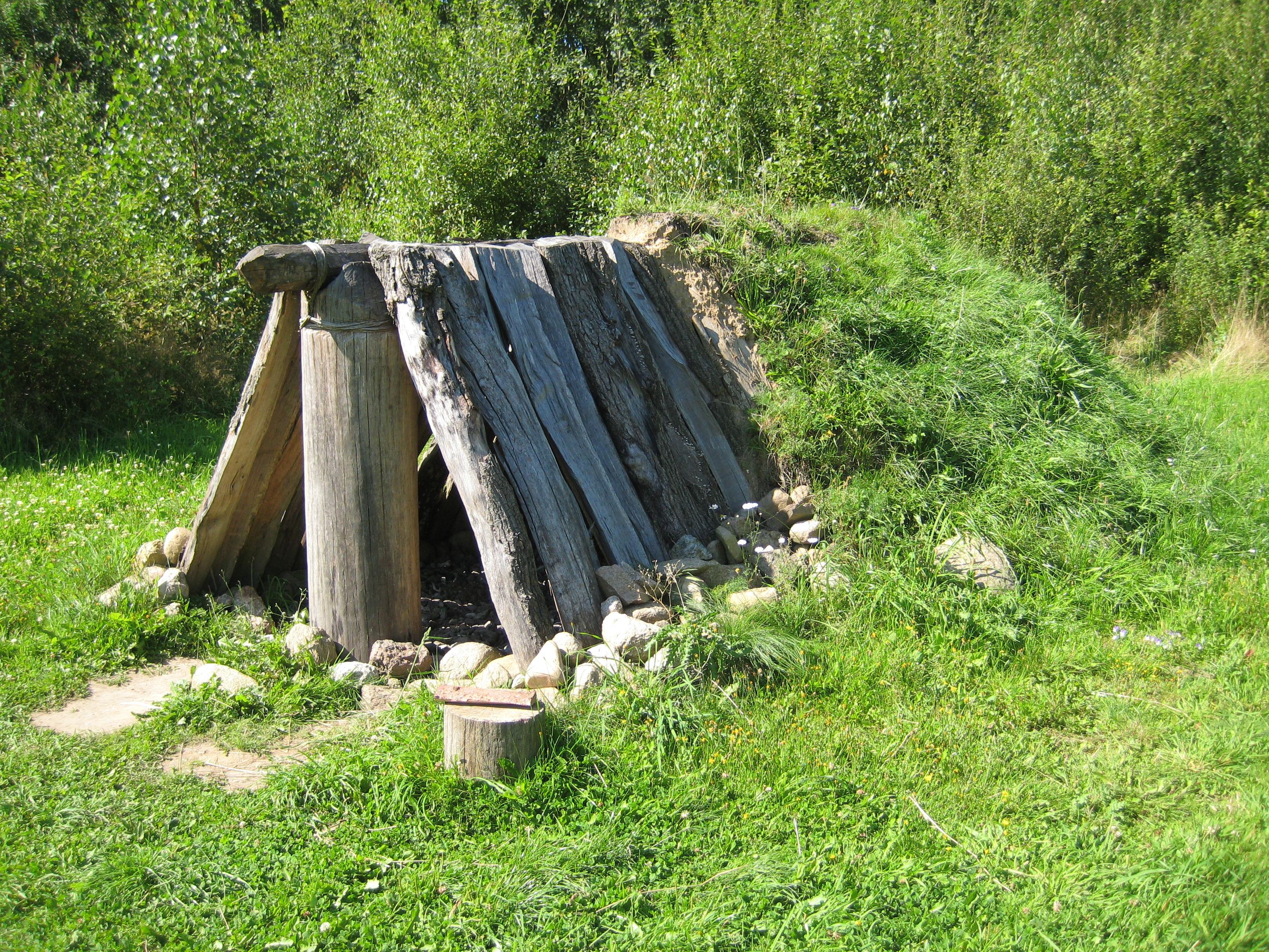 Fotos aus dem Naturerlebnisraum Archäologisch-Ökologisches Zentrum Albersdorf Nachbildung einer Totenhütte aus Flintbek